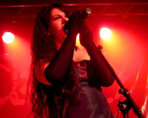 Annlouice